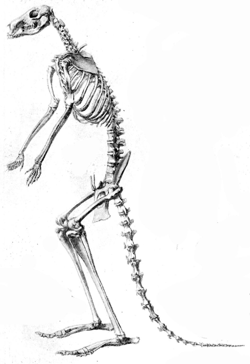 Skelett vom Känguruh